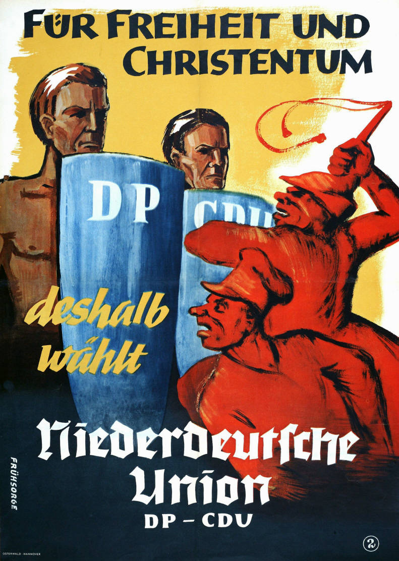 Für Freiheit und Christentum DP CDU deshalb wählt Niederdeutsche Union DP-CDU 2 Abbildung: Nordische "Kraftprotze" schützen vor Rotarmisten und rotem Gesindel (Grafik) Plakatart: Motiv-/Textplakat Künstler_Grafiker: Frühsorge Auftraggeber: DP-CDU/Niederdeutsche Union Drucker_Druckart_Druckort: Osterwald, Hannover Objekt-Signatur: 10-008 : 106 Bestand: Landtagswahlplakate Niedersachsen (10-008) GliederungBestand10-18: Landtagswahlplakate Niedersachsen (10-008) » DP-CDU/Niederdeutsche Union Lizenz: KAS/ACDP 10-008 : 106 CC-BY-SA 3.0 DE